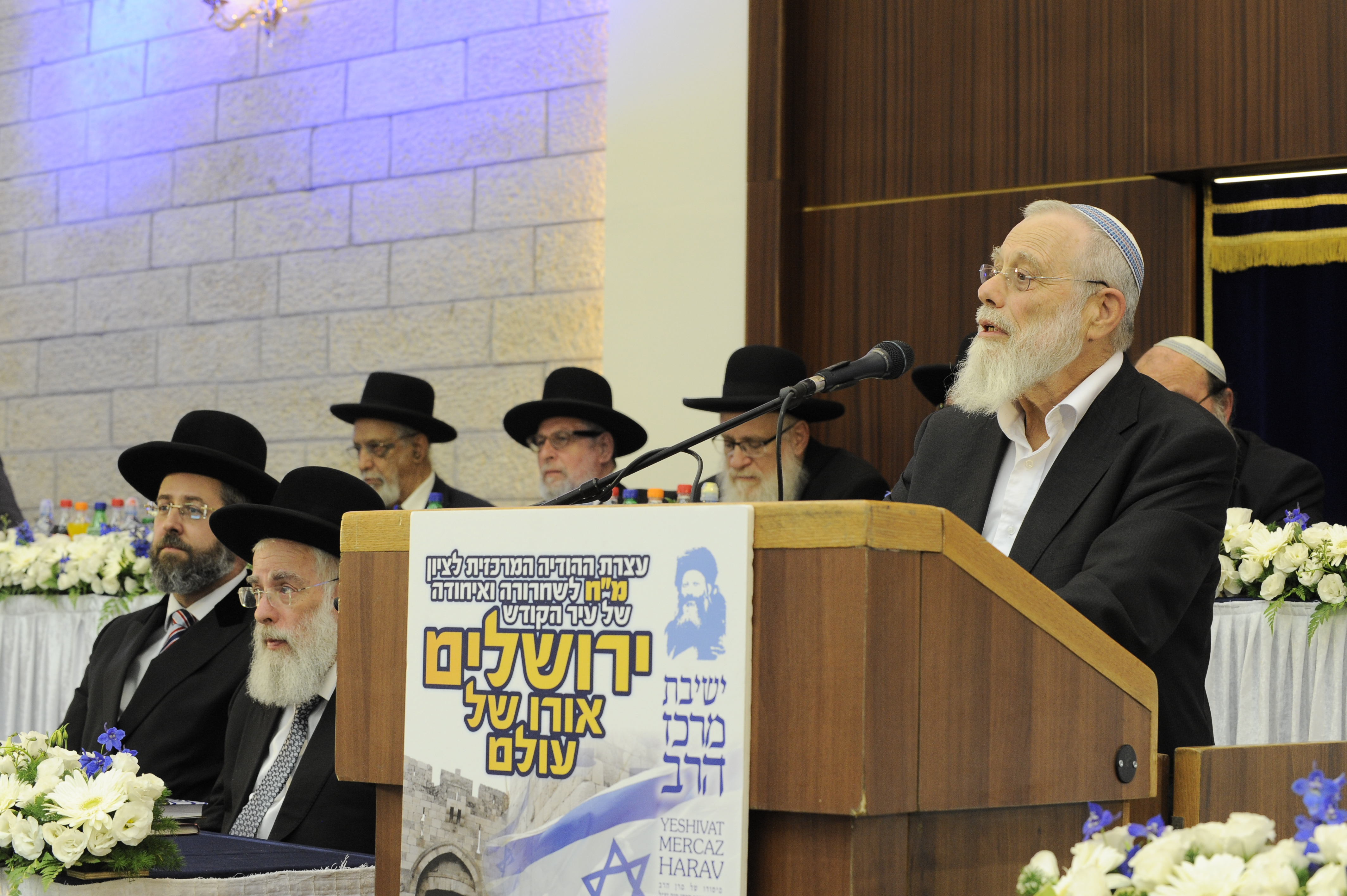 הרב איתן איזמן